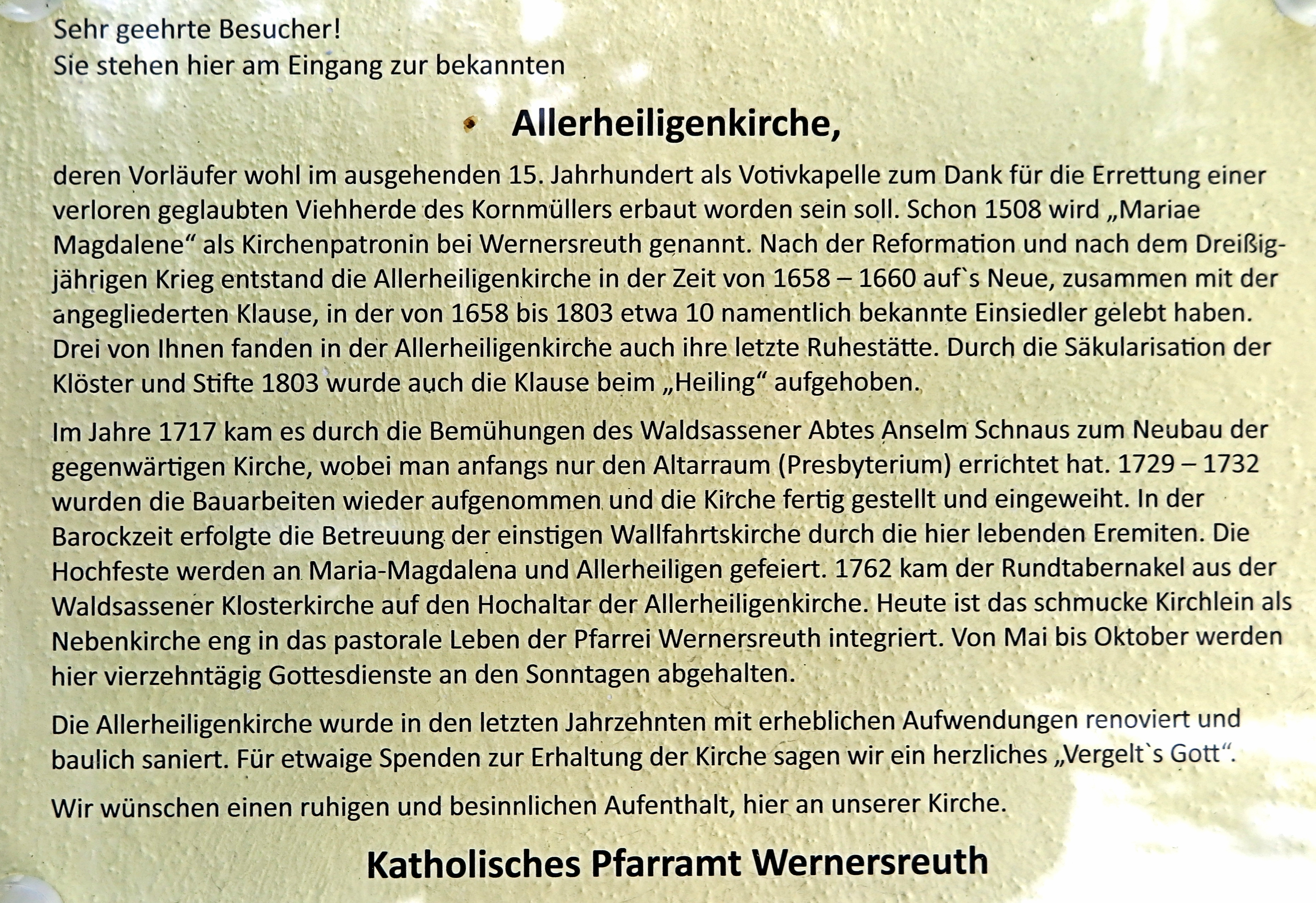 Deutschland, Bayern, Oberpfalz, Landkreis Tirschenreuth, Gemeinde Leonberg, westlich von Wernersreuth, Allerheiligenkirche, Gebäudeinfotafel